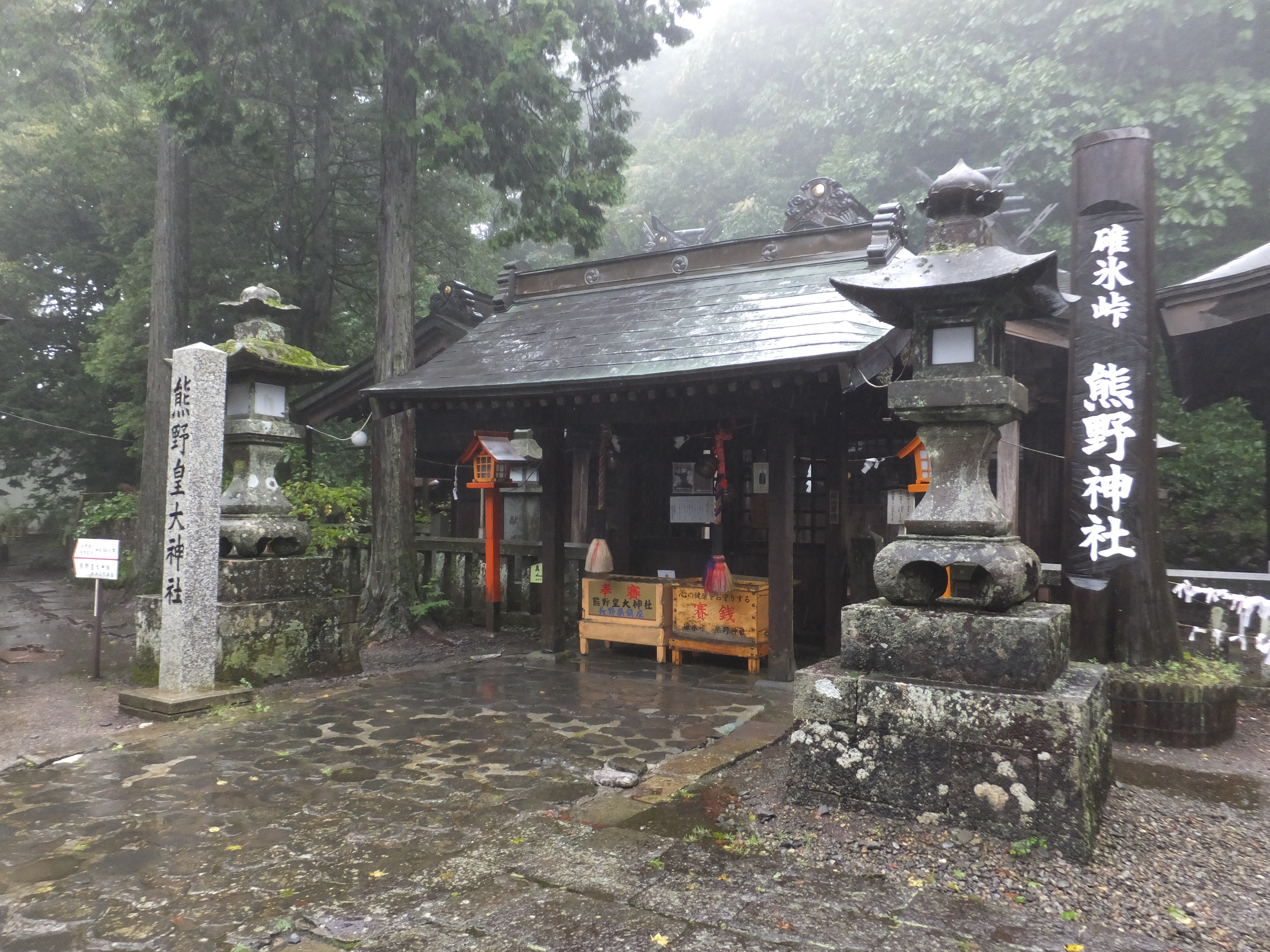 熊野神社の外観。(群馬県側から撮影) 2016年9月撮影。